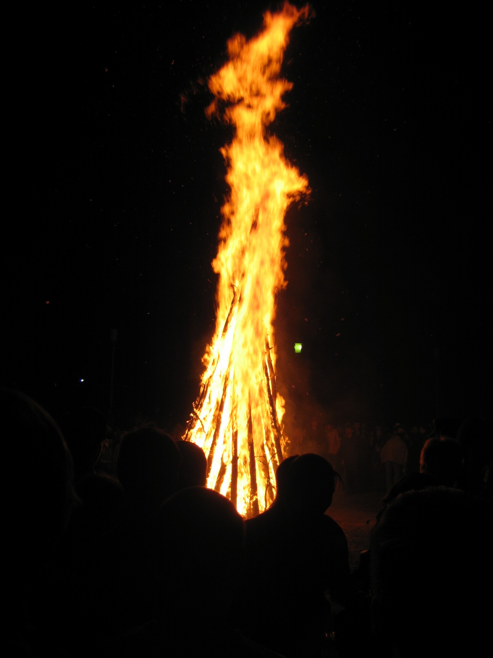 Feu de Maiovka a Akademgorodok